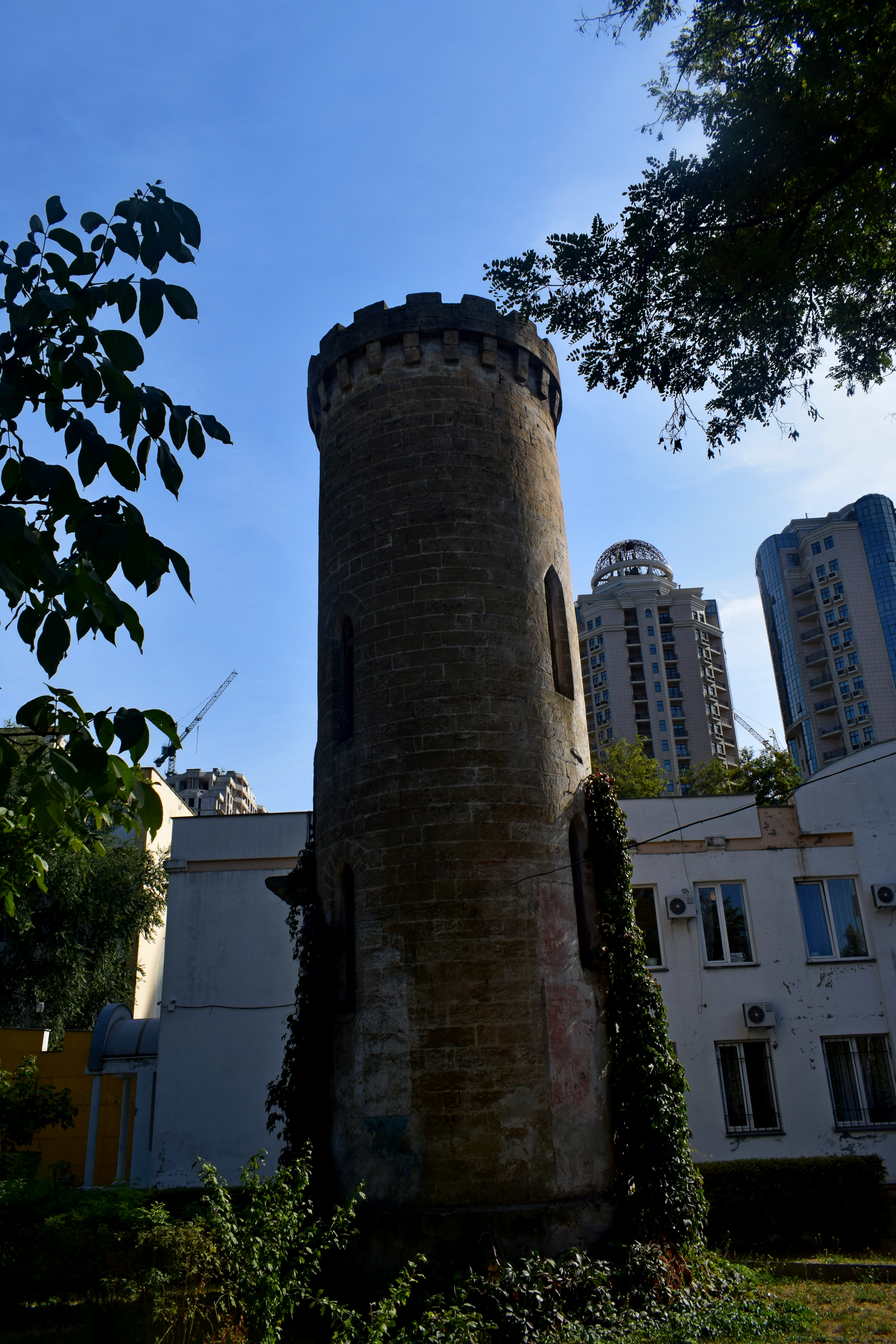 Особняк Клімовецького з баштою, Одеса, Піонерська вул., 28